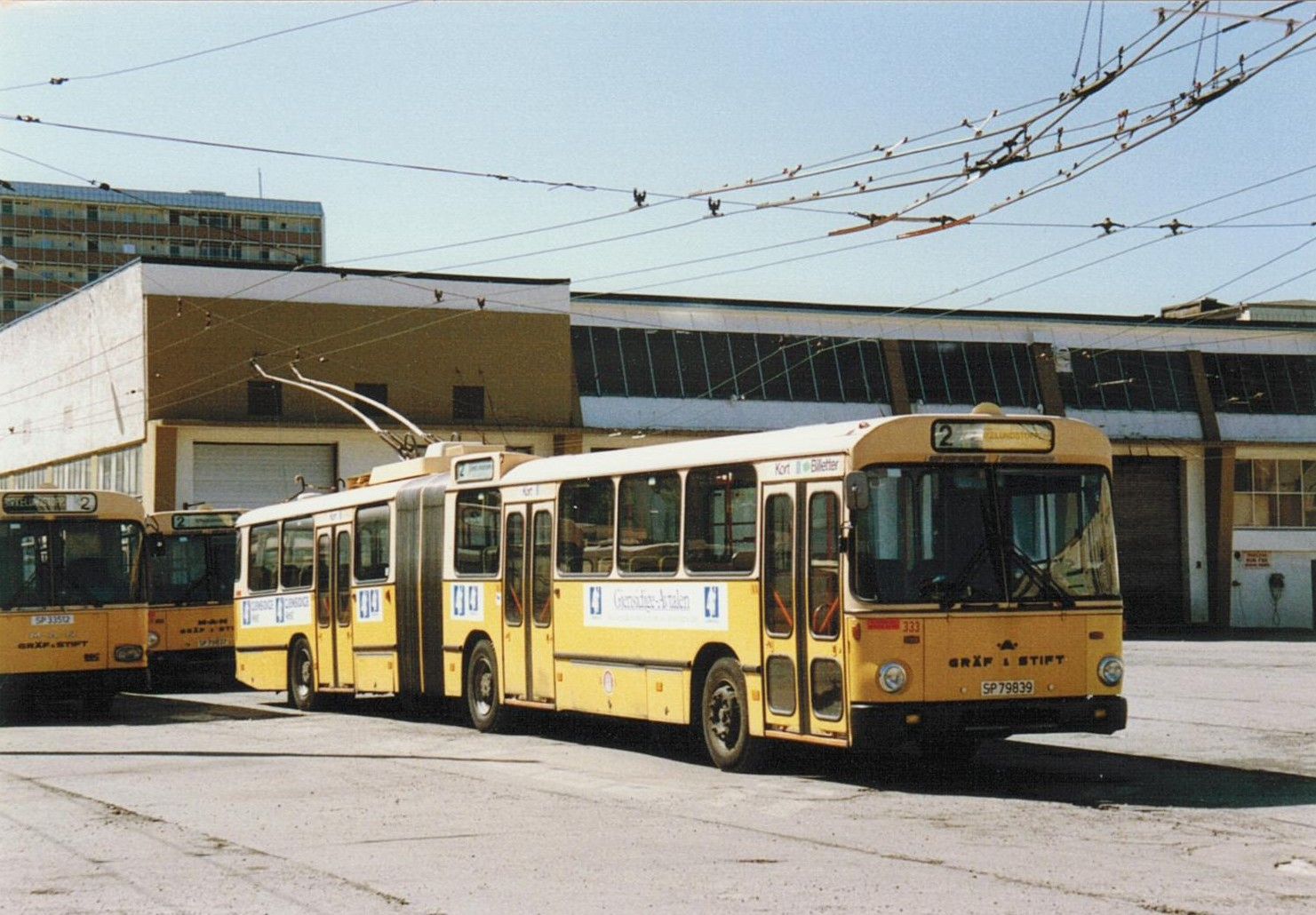 Trolleybus 333 in Bergen (Norwegen) im Busdepot